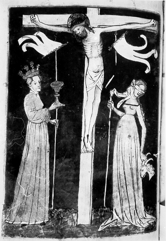 Christus am Kreuz. In: Historienbibel, Staats- und Stadtbibliothek Augsburg, 2° Cod. 50